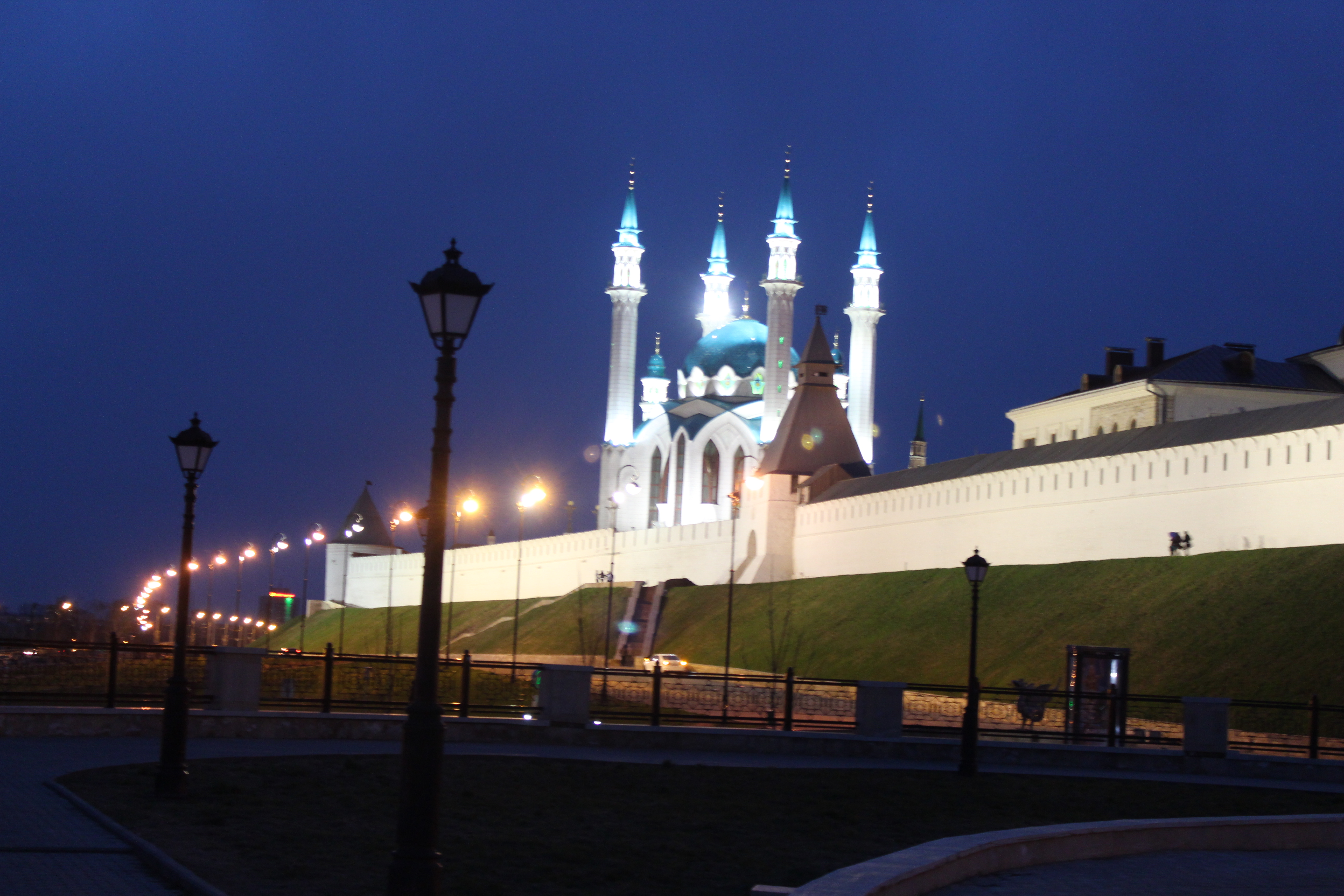 Мечеть Кул-Шариф (Республика Татарстан, Казань)